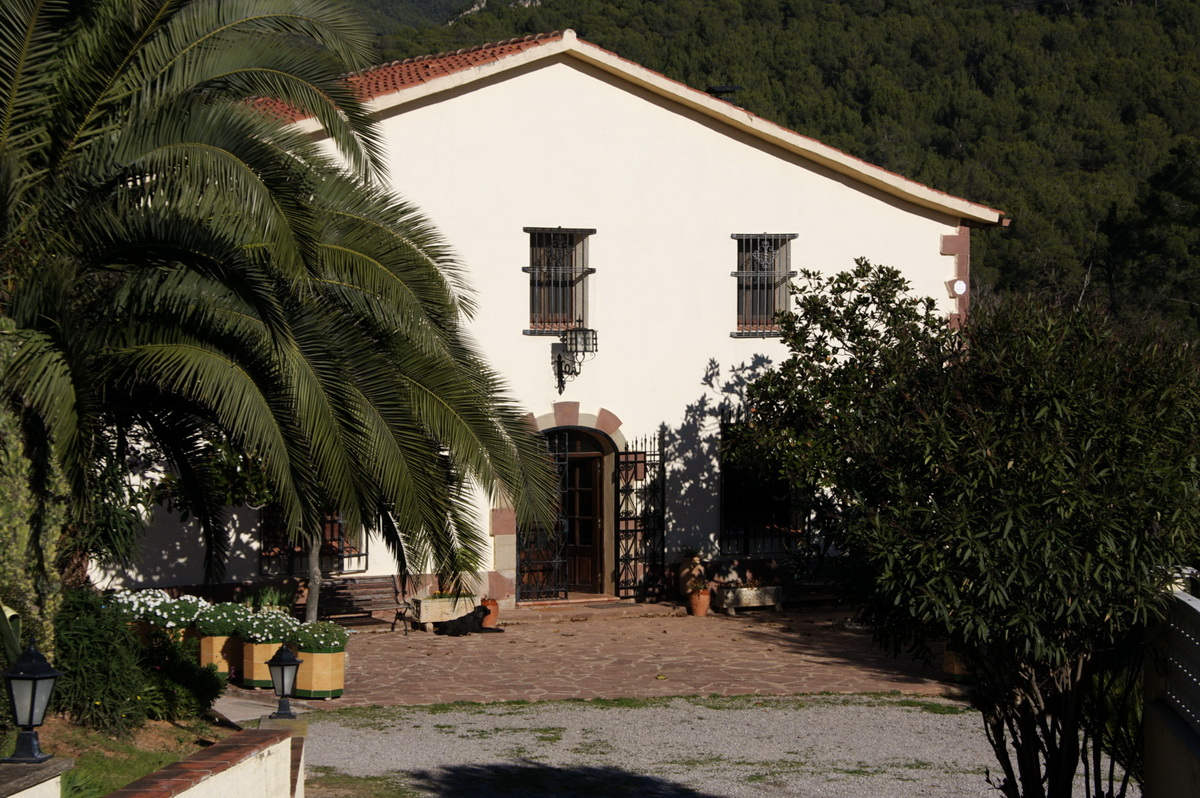 Can Feliuà (Bigues i Riells, Vallès Oriental)